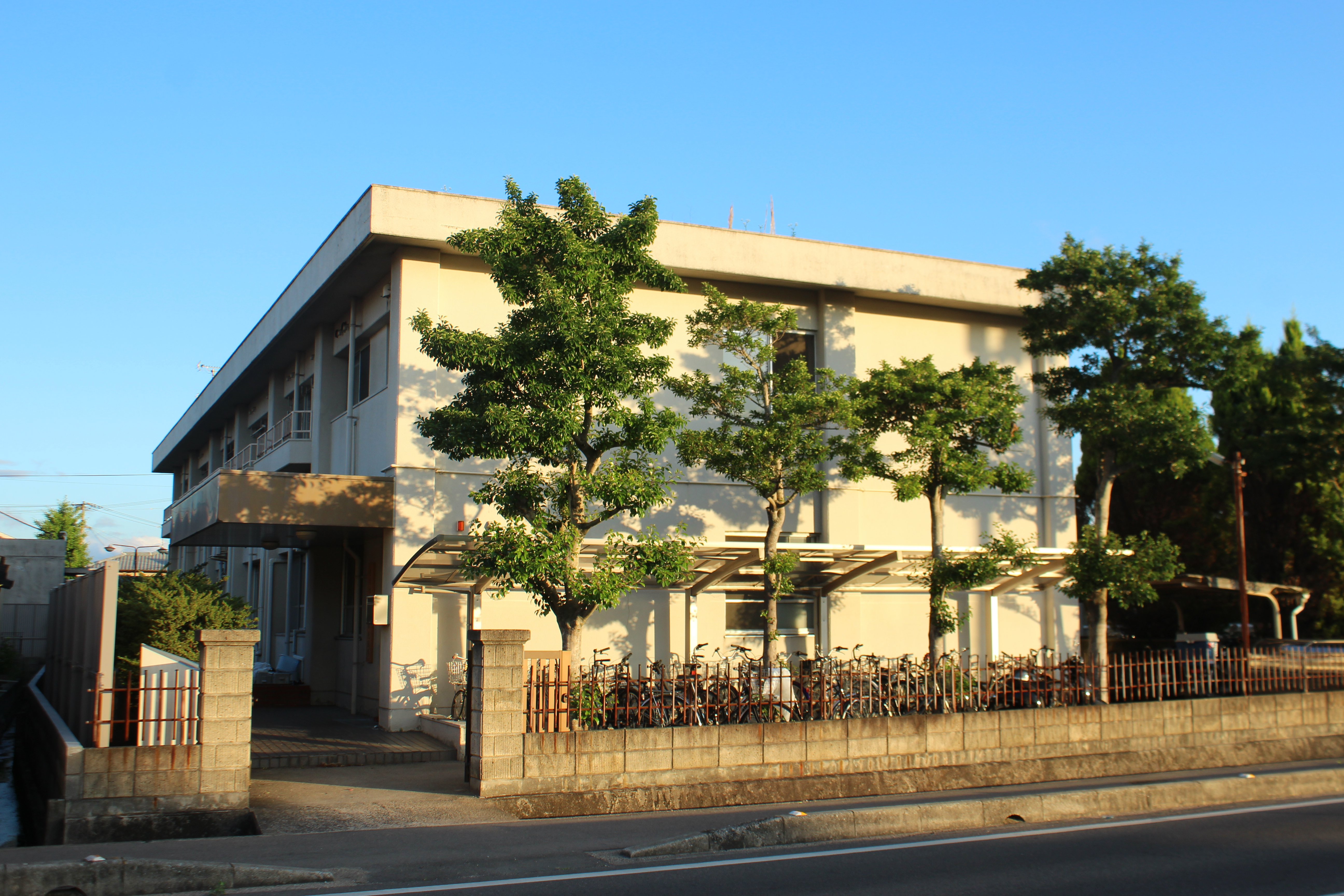 東側より撮影した光風寮